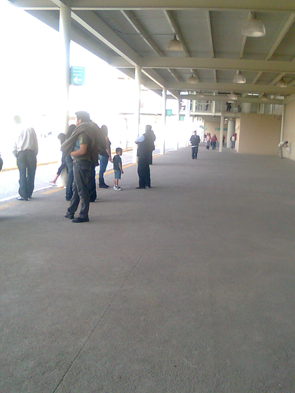 terminal ojo de agua